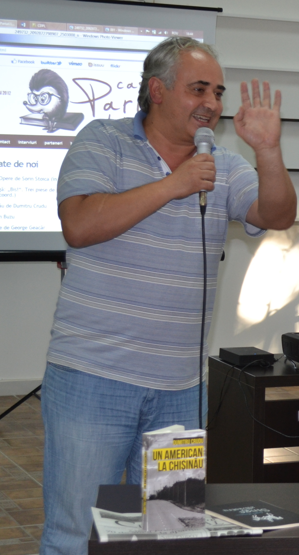 Petru Hadârcă recomandă recenta carte a lui Dumitru Crudu